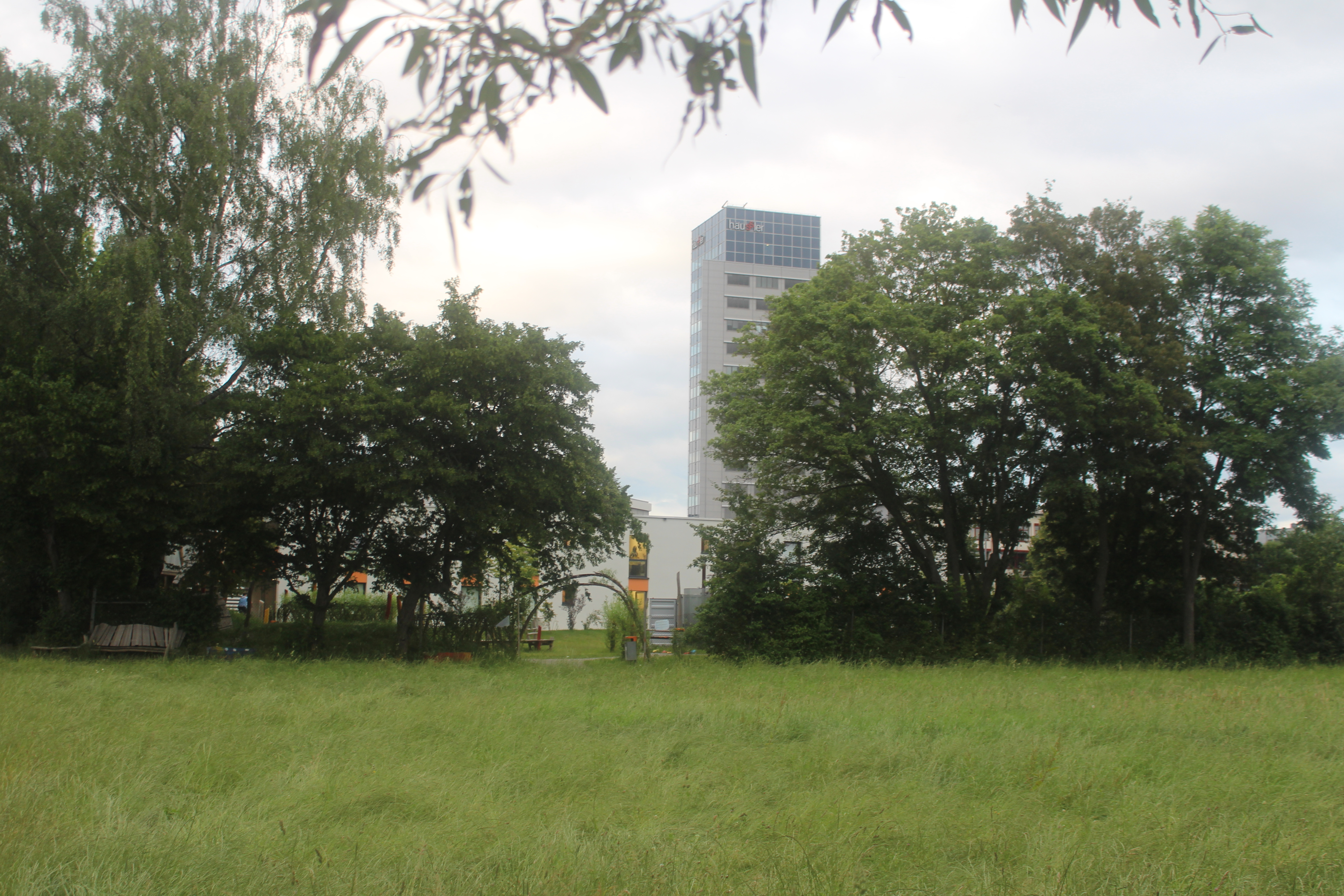 Areal der einstigen 220-kV-Schaltanlage des Umspannwerks Möhringen in Stuttgart, jetzt Platz eines Asylbewerberheims